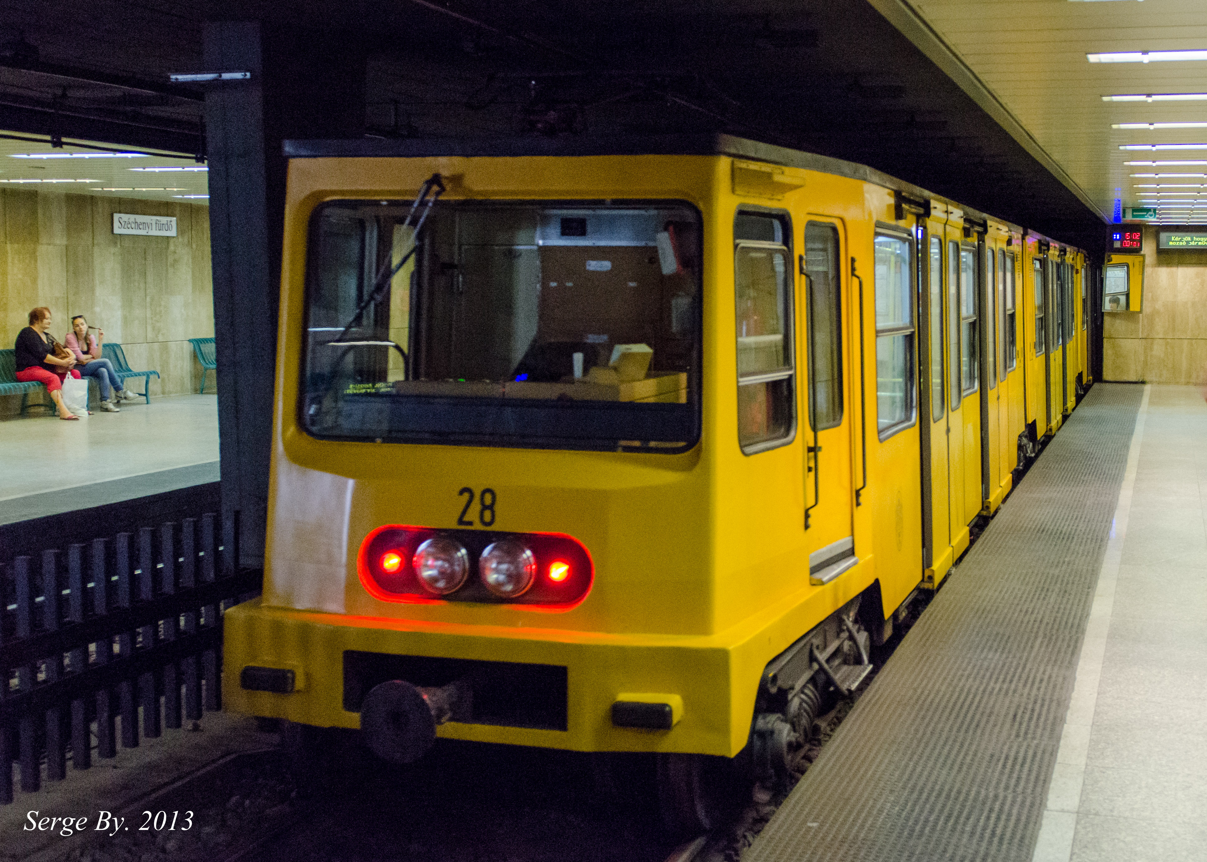 Метро, Будапешт